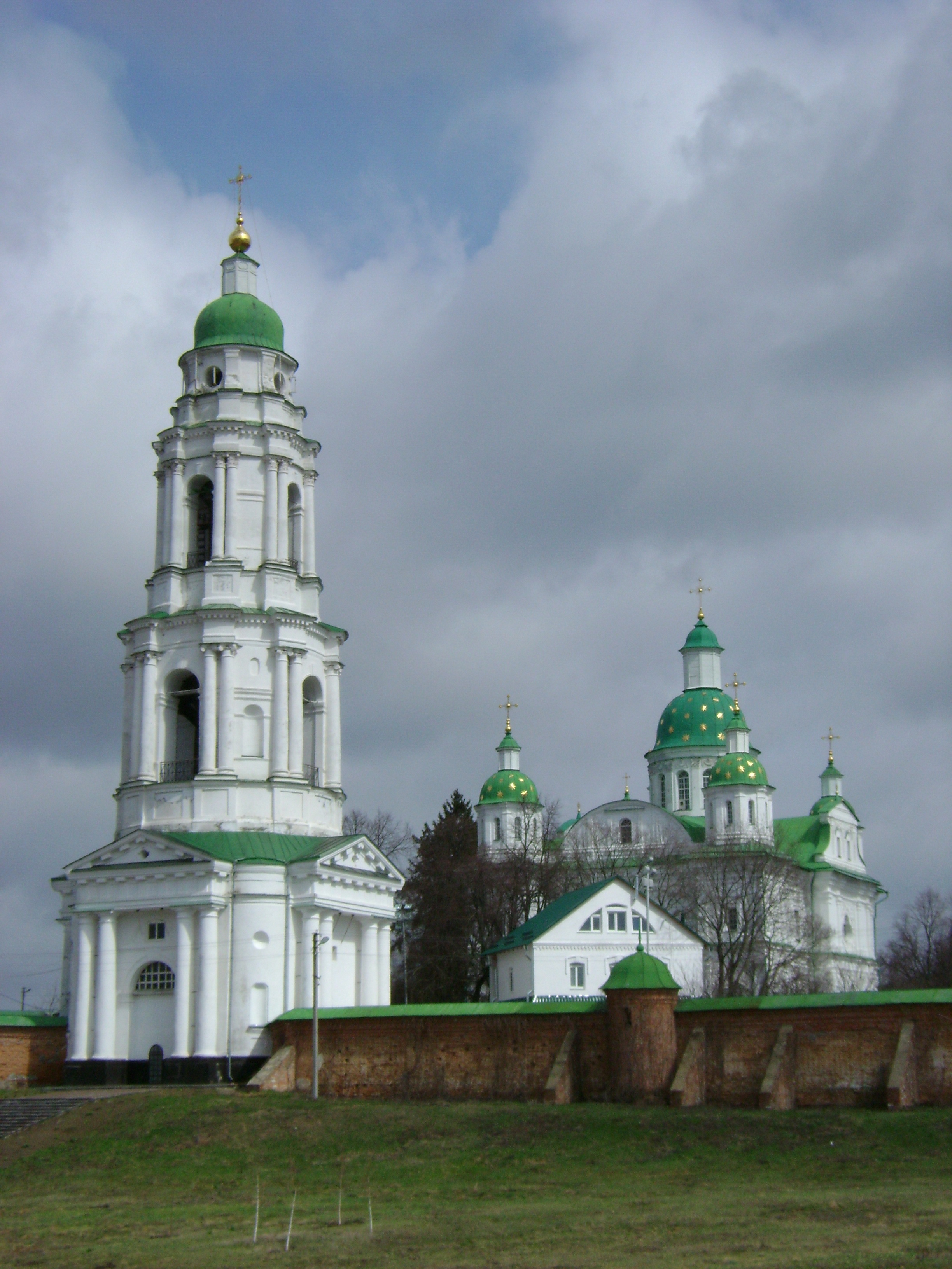 Спасо-Преображенський Мгарський монастир, Мгар